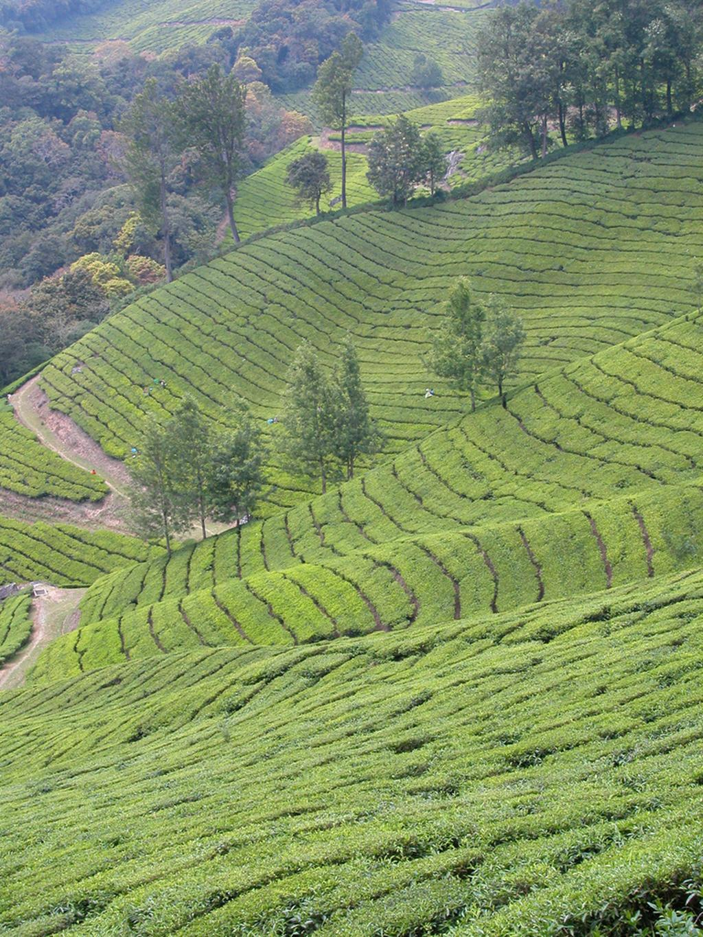 Tea estate in Wayanad